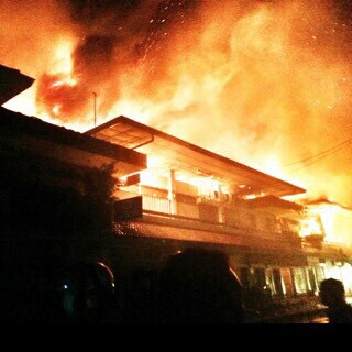 Pasar Klewer Terbakar (Surakarta) 2014-12-27